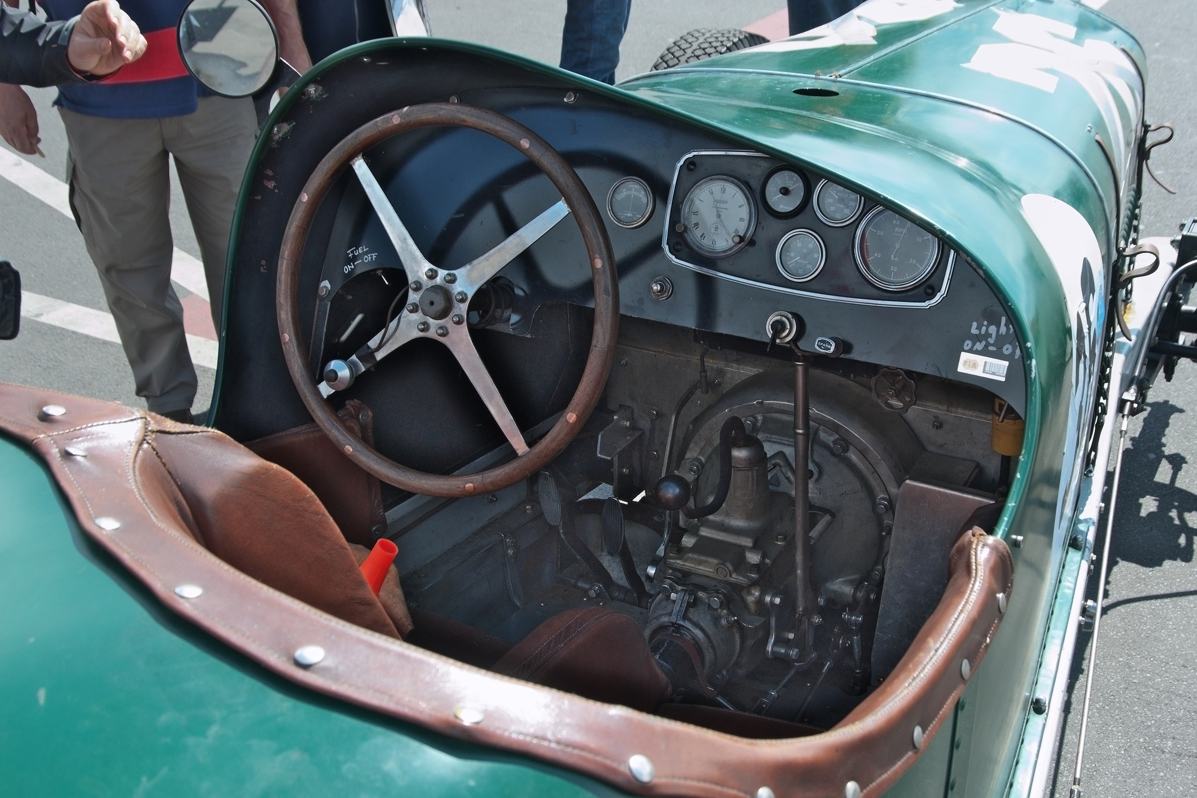 1932 Buick Shafer 8